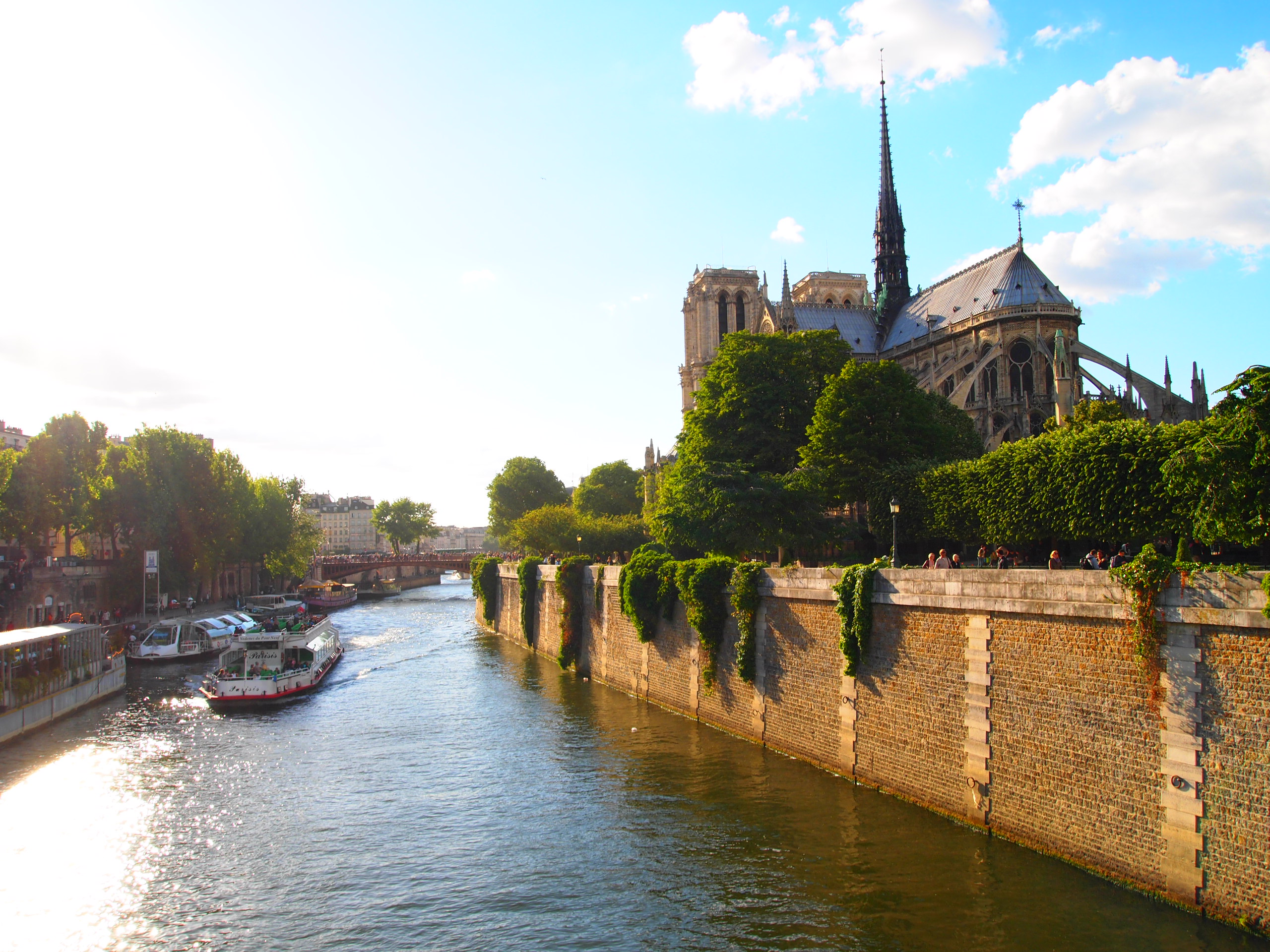 Sur la droite, le square Jean-XXIII sur l'Île de la Cité